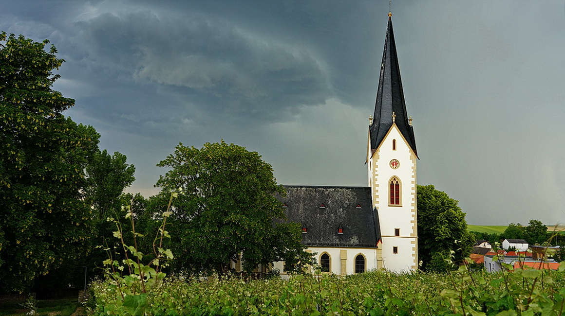 Kath. Kirche Gabsheim